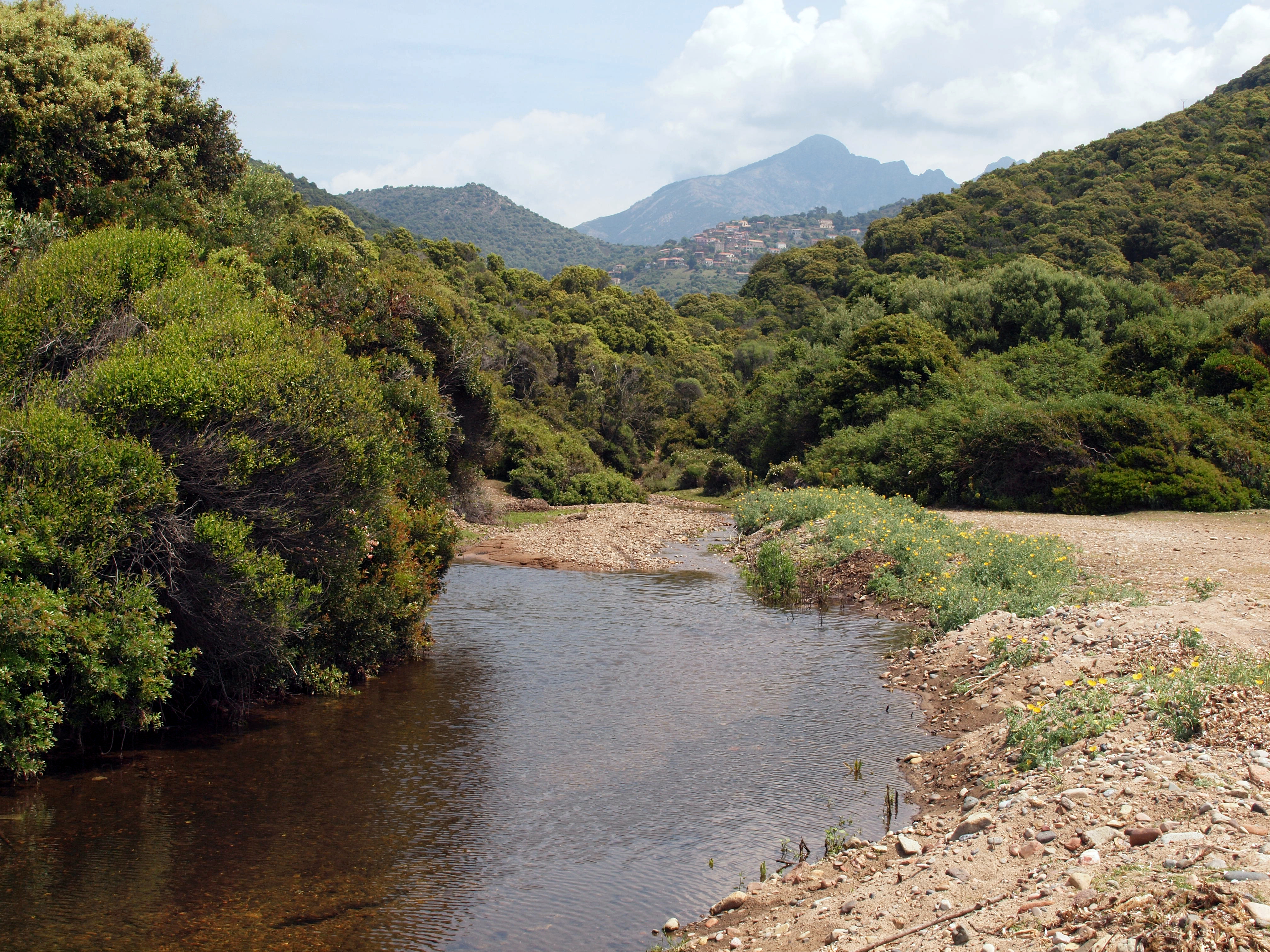 Partinello, Ouest Corse - Le ruisseau de Pilatri dans le site naturel de Gradelle-Caspiu du Conservatoire du littoral, proche de son embouchure dans la baie de Caspiu. Il sépare les communes d'Osani et de Partinello dont le village est perceptible en haut de la vallée.